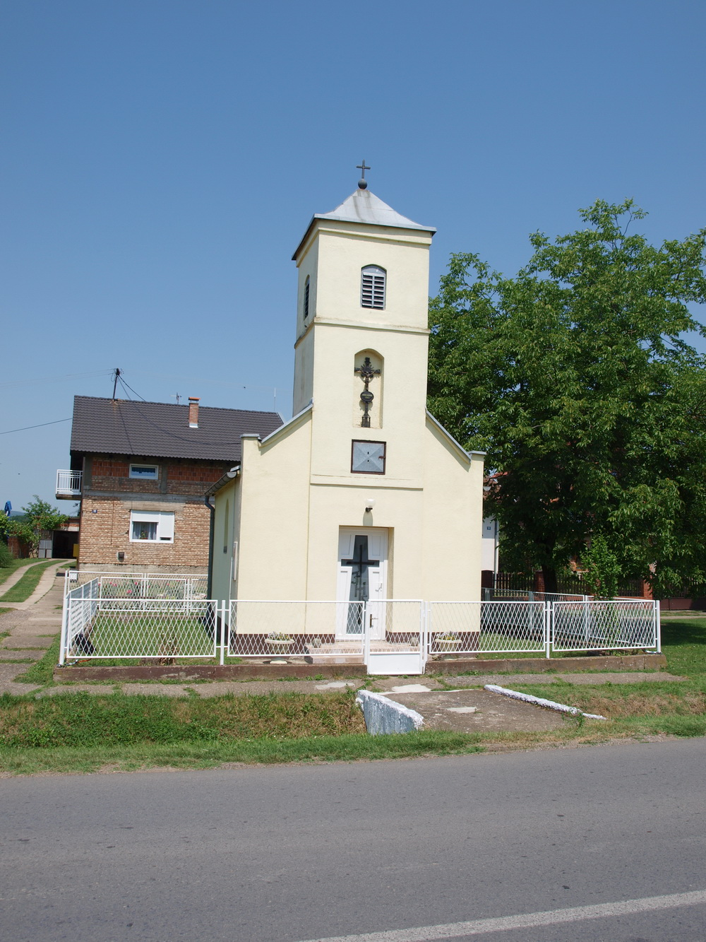 Kapela u selu Sapci, Brodsko-posavska županija.